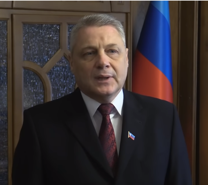 Поздравление Председателя Совета Министров ЛНР Сергея Козлова с 4 годовщиной образования НМ ЛНР